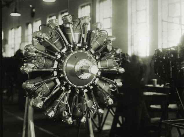 Motor I.Ae. R-19 CR/2 El Indio (Versión 840 CV)